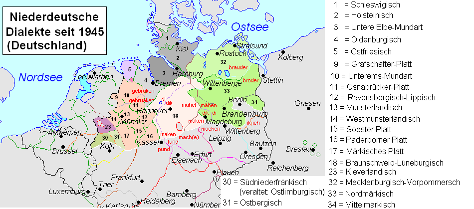 niederdeutsche Dialekte nach dem Jahr 1945